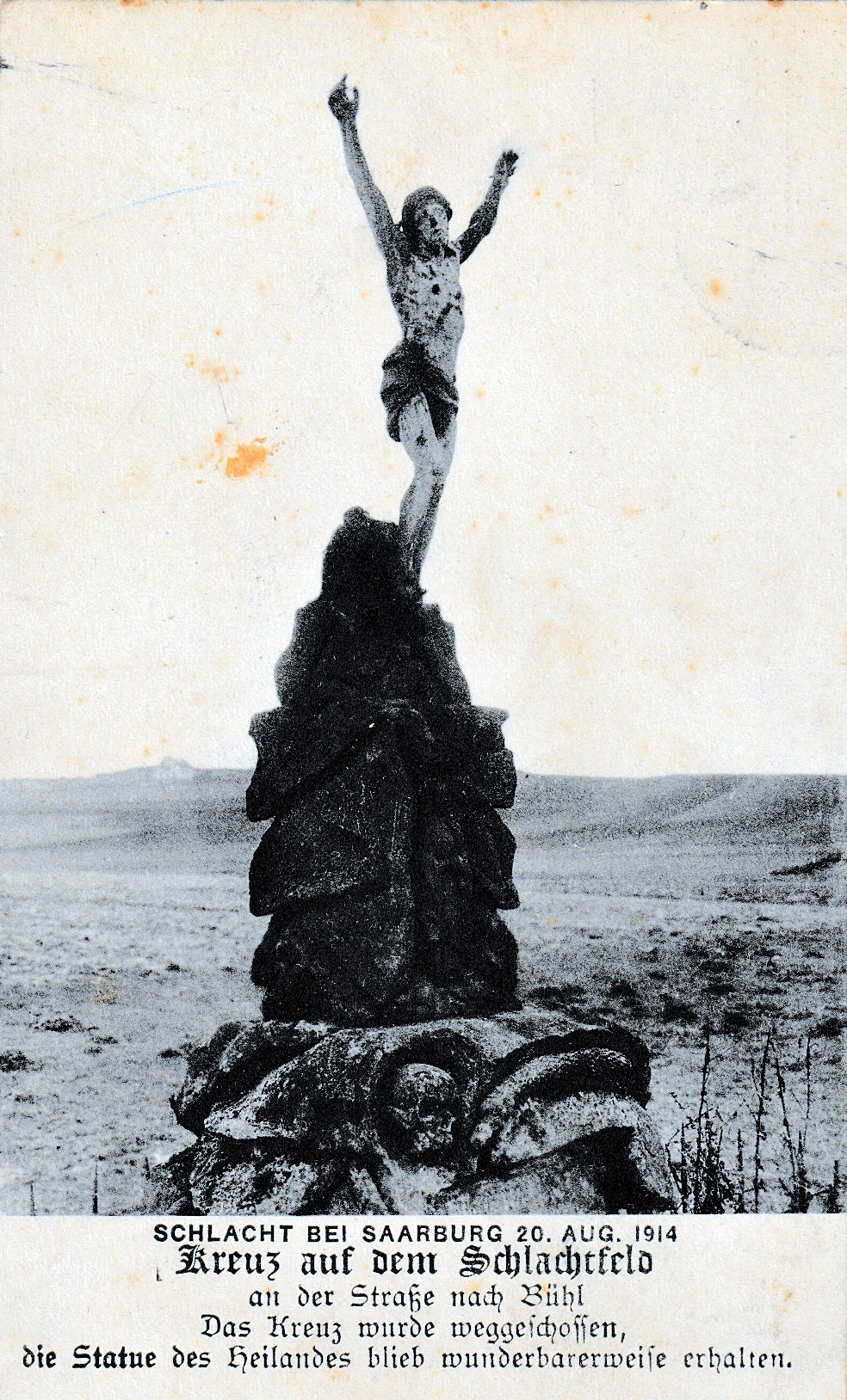 Sogenanntes Kreuz bei Saarburg (in Buhl stehend), dem am 20.8.1914 das Kreuz wegeschossen wurde und die Christusfigur stehen blieb. (eigener Scan von eigener alter Postkarte, von 1915)